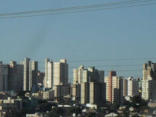 Região Central de Uberlândia - MG.